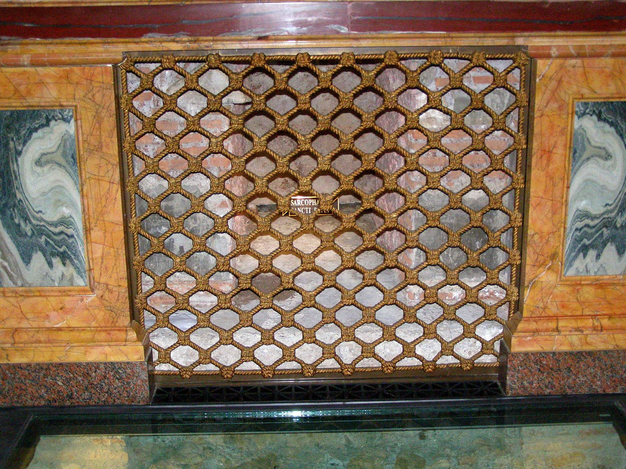 Hrob sv. Pavla v Bazilike svätého Pavla za hradbami